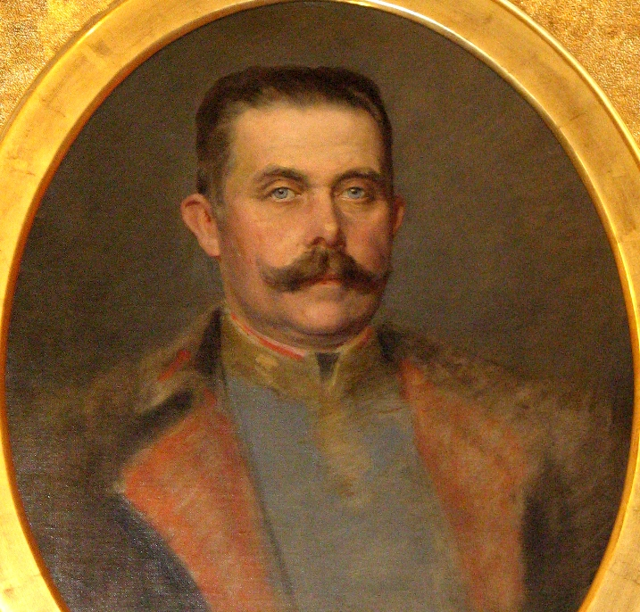 Porträt Franz Ferdinand von Österreich-Este